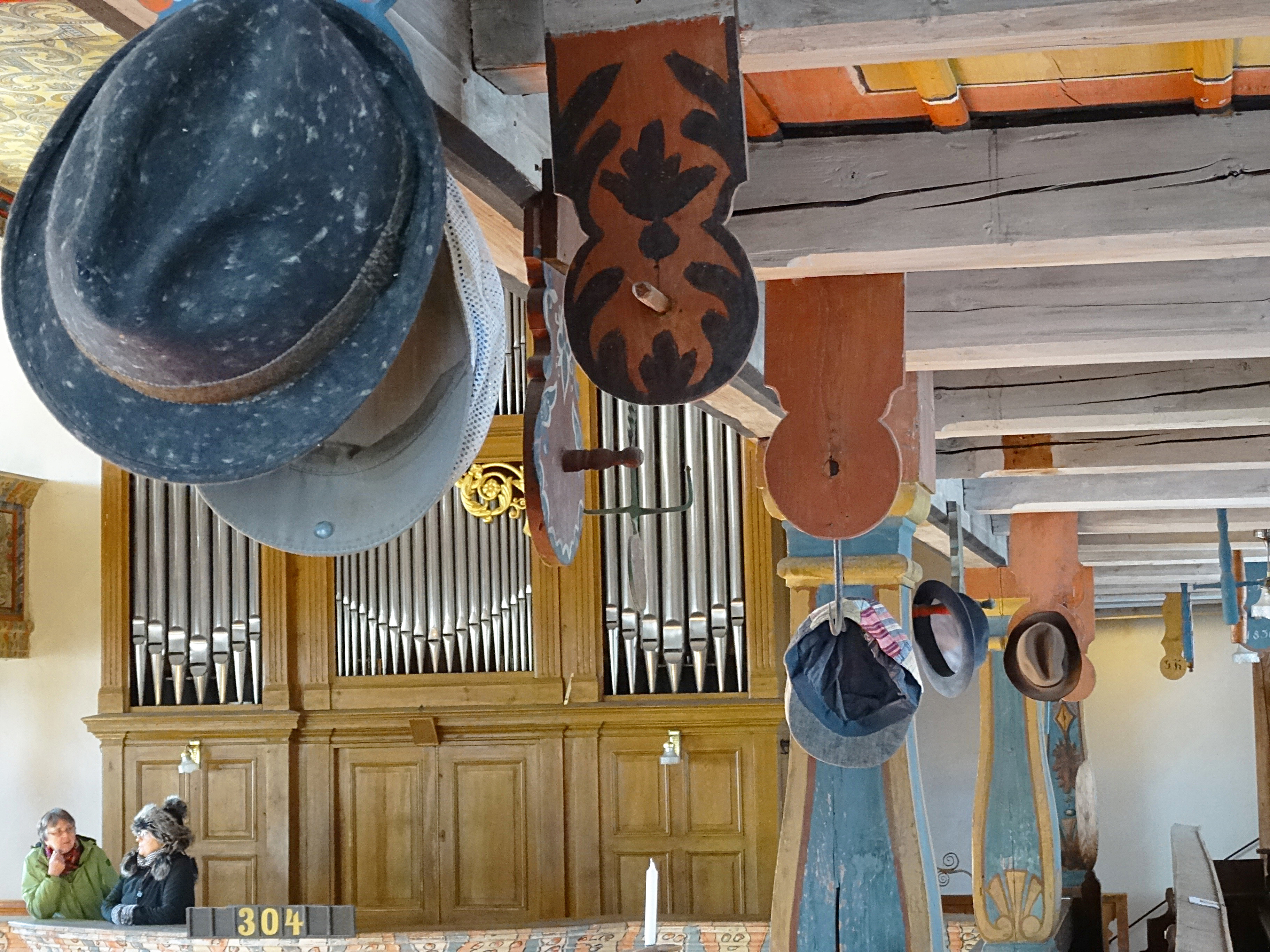 einzigartige historische Huthalter in der Oberseifersdorfer Kirche